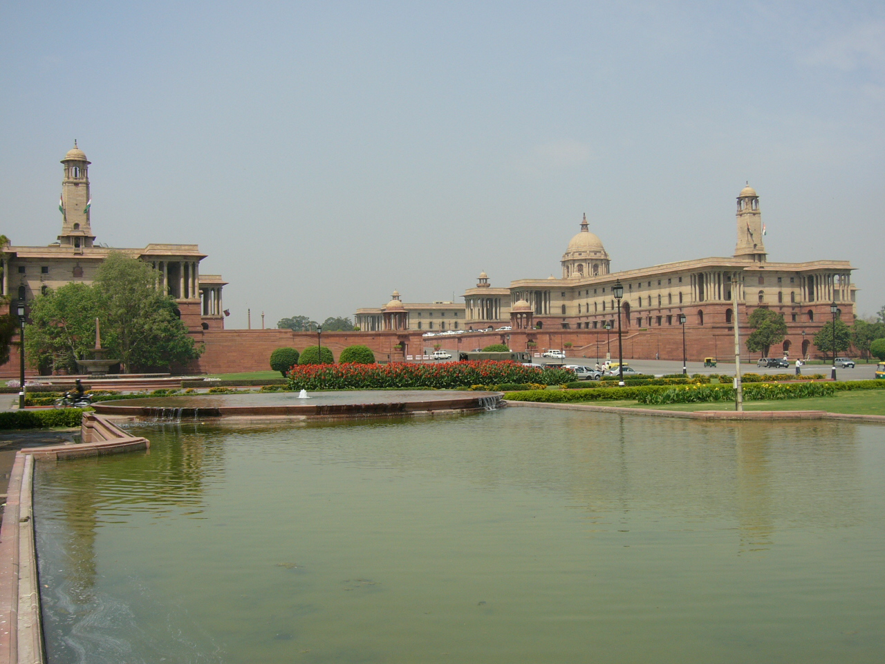 Indian Parliament Building Delhi India